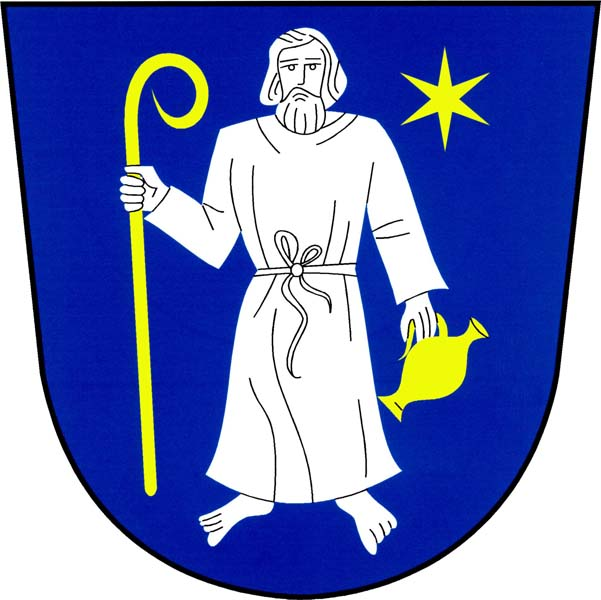 znak obce Luká